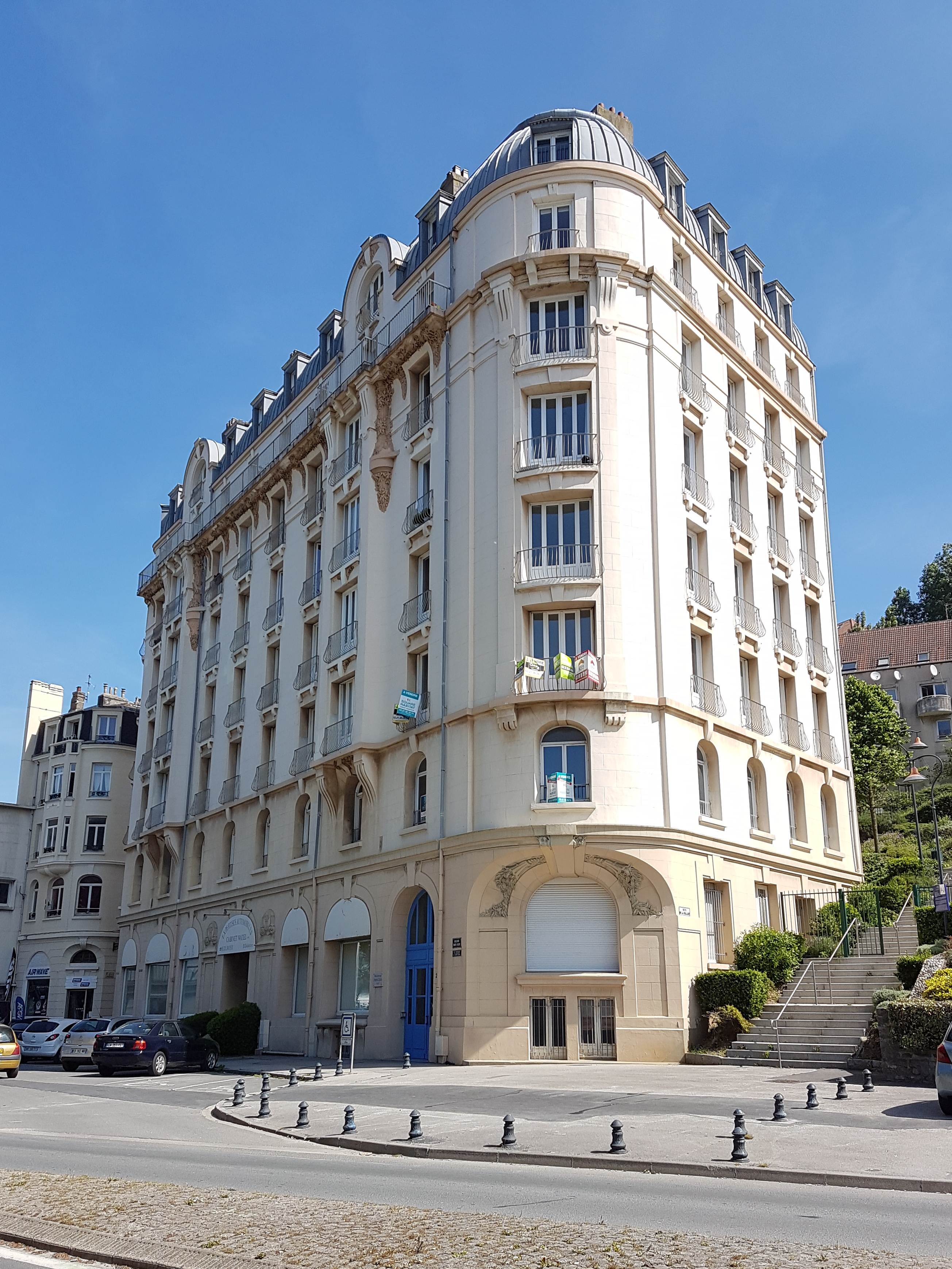 L'hôtel Princess à Boulogne-sur-Mer (Pas-de-Calais)